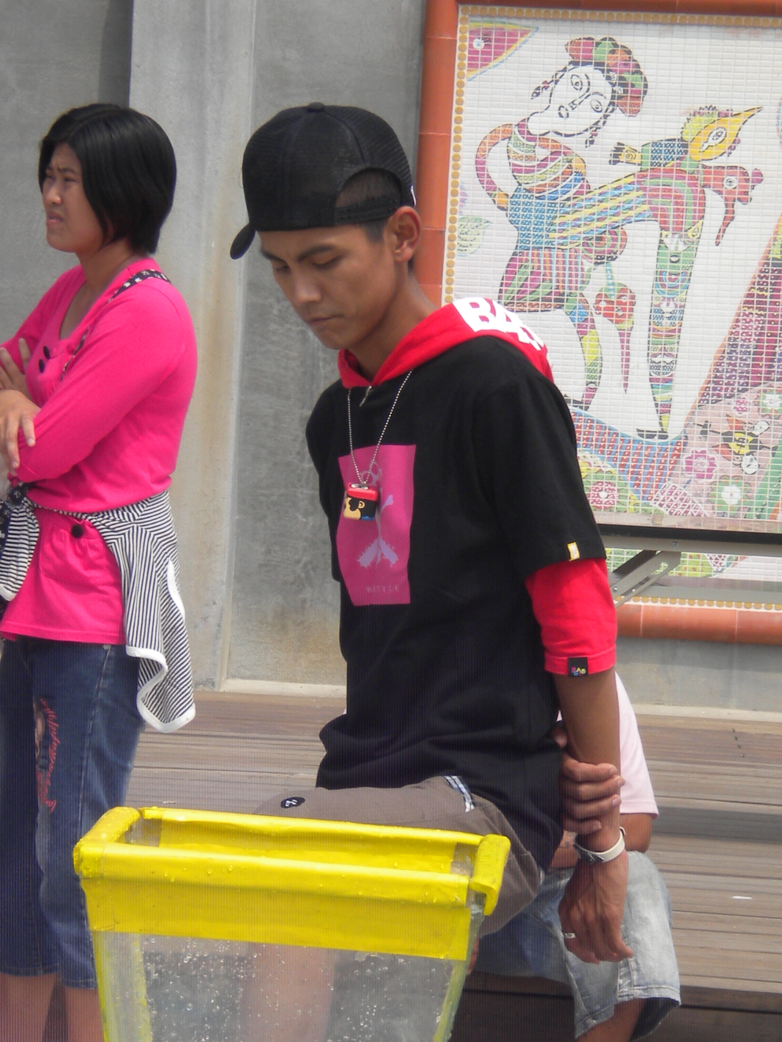 浩角翔起的阿翔